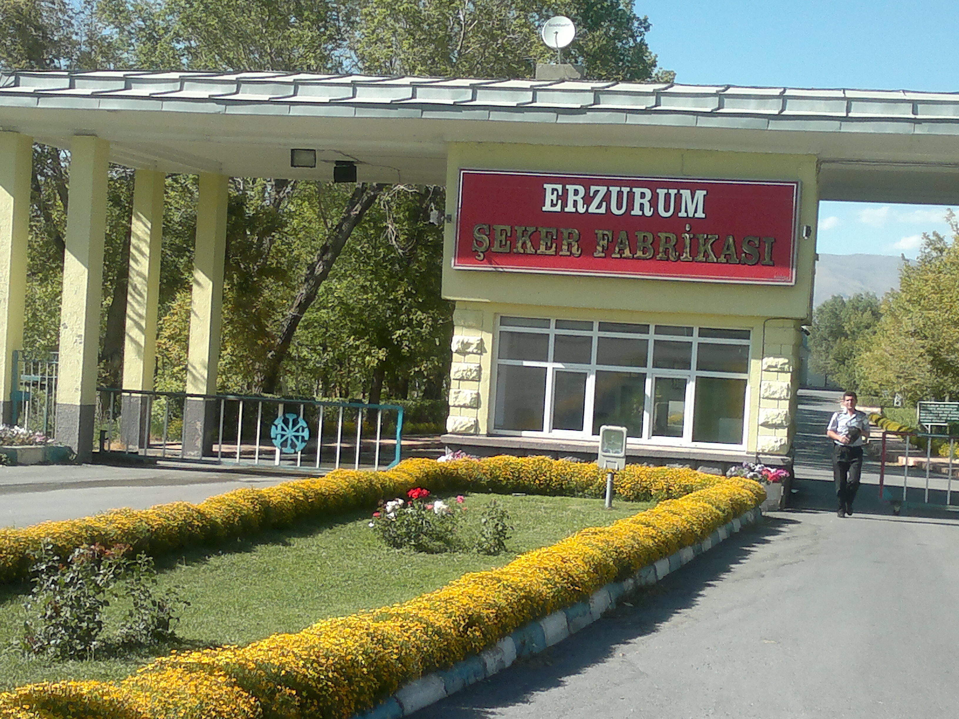 Erzurum Şeker Fabrikası Giriş